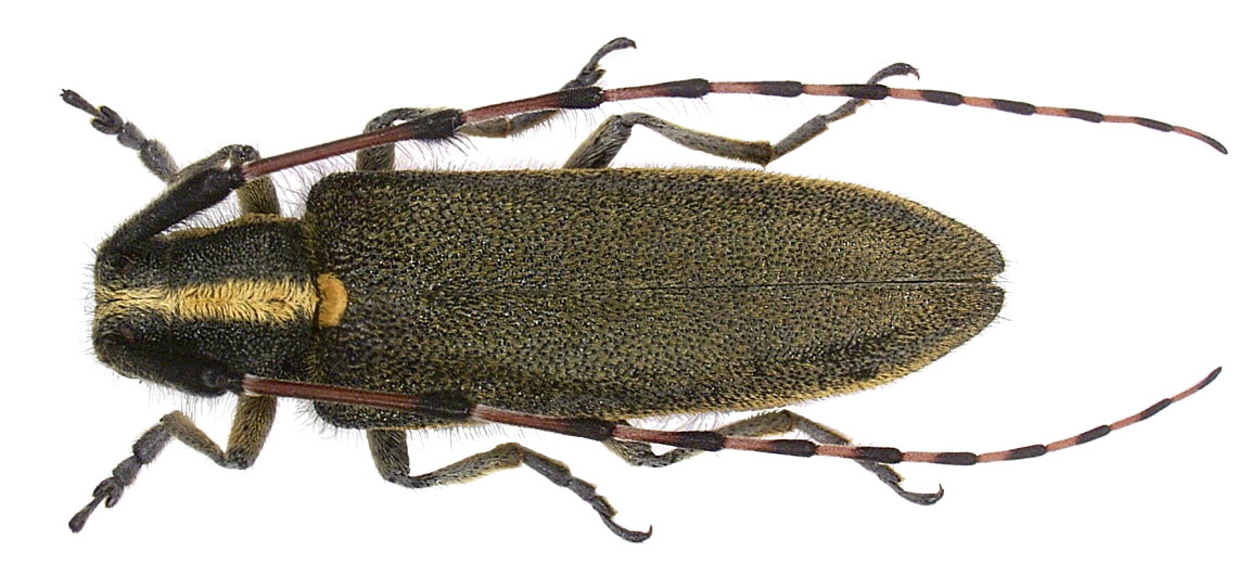 Familie: Cerambycidae Grösse: 16-21 mm Verbreitung: Jugoslavien, Griechenland, Türkei Fundort: Türkei, Prov. Antalya, Mahmutlar leg. A.Skale, 2004; det. A.Weigel Foto: U.Schmidt, 2006